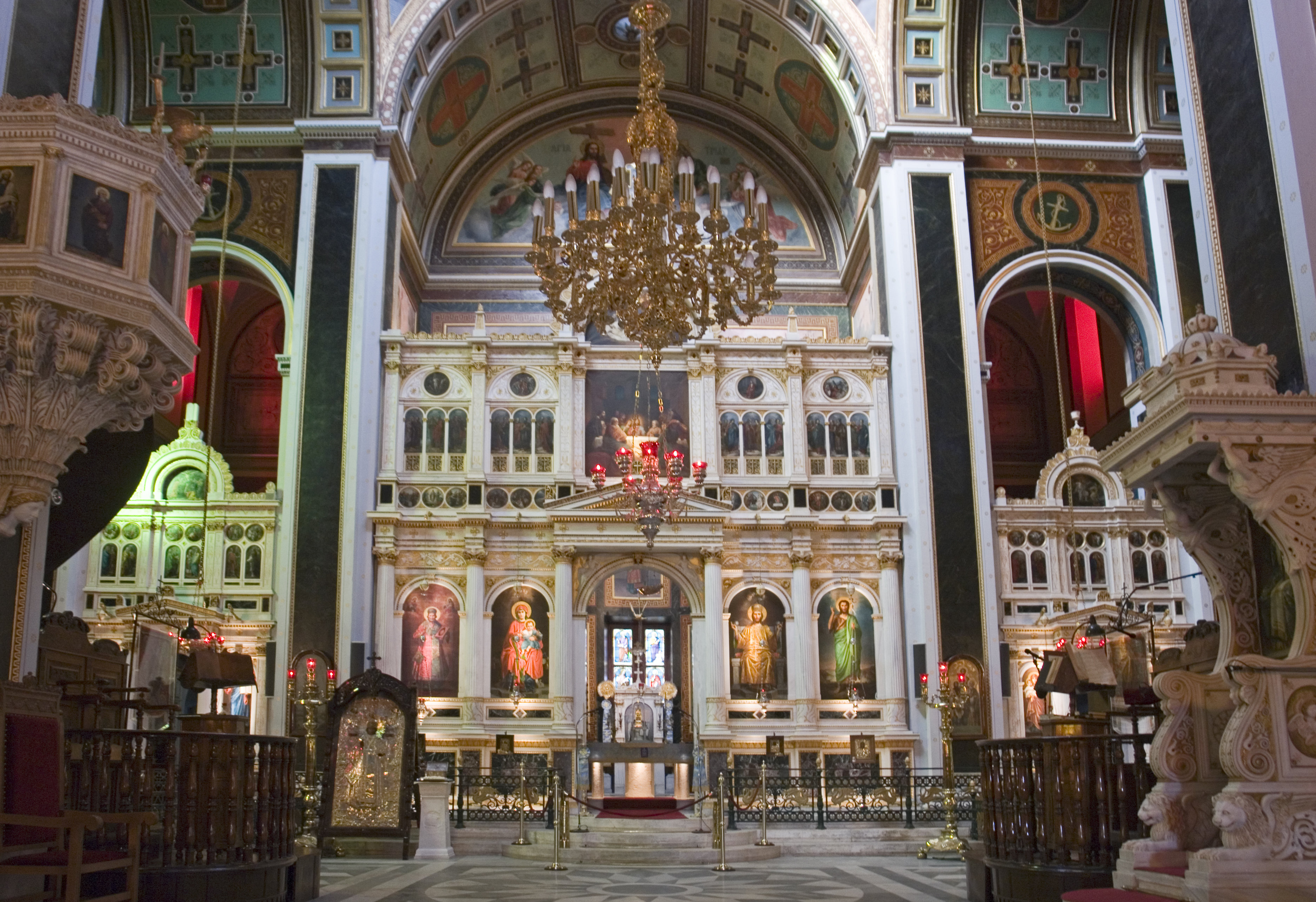 Syros, Innenansicht Agios Nikolaos in Ermoupolis